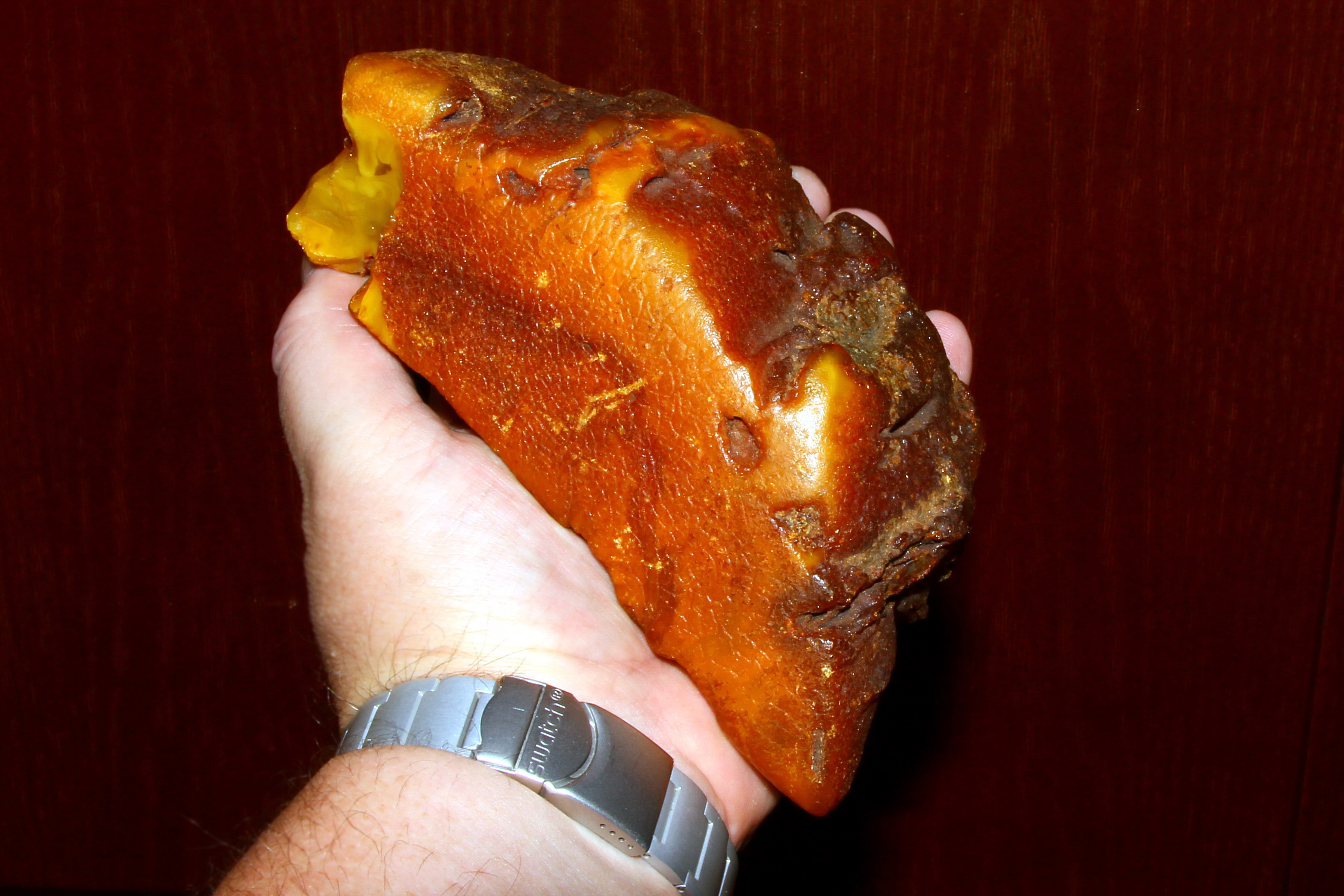 Bursztyn bałtycki (Amber from the Baltic Sea) - Jantarnyj (Palmniken), Półwysep Sambijski, Rosja.